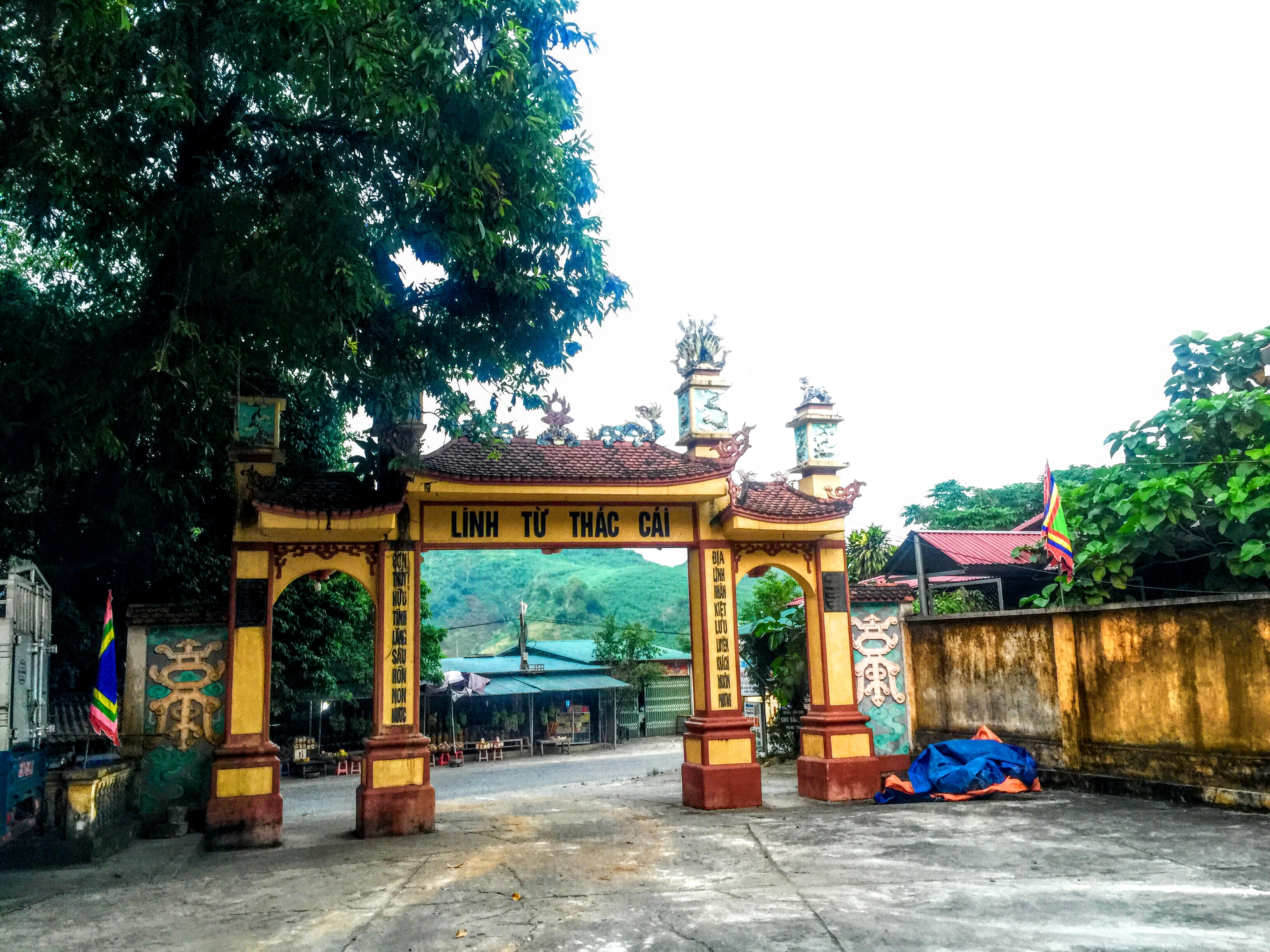 Chua Thac Cai,Ham Yen,tinh Tuyen Quang.Vn